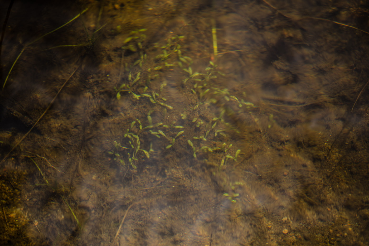 Slamkrypa Elatine hydropiper L.